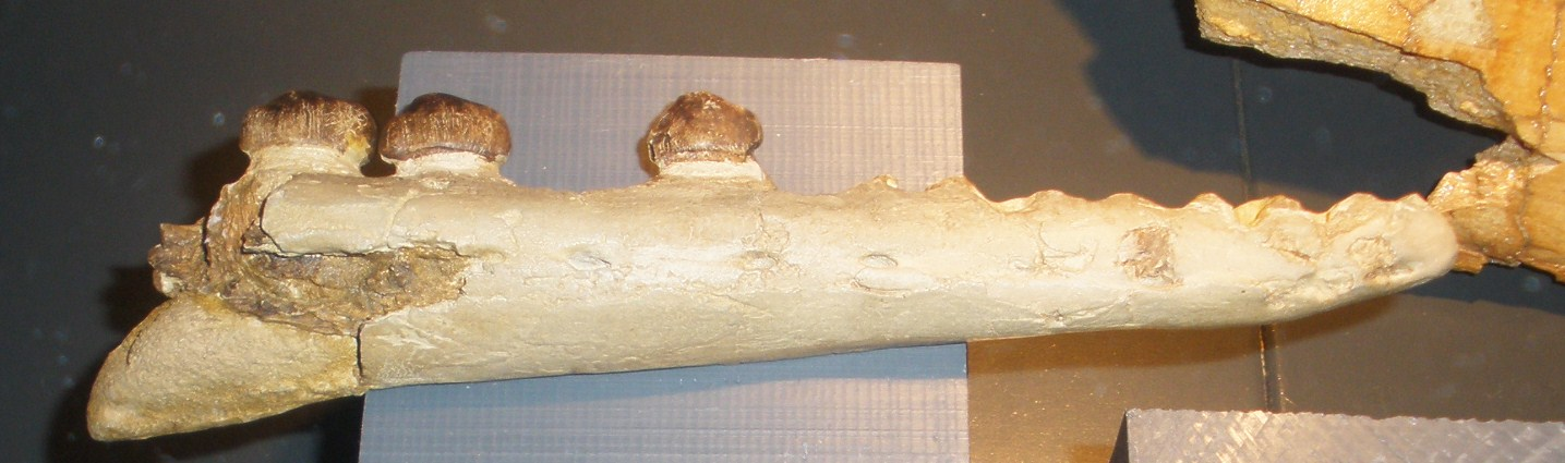 Fossil of Carinodens, an extinct mosasaur- Took the photo at Natural History Museum of Maastricht